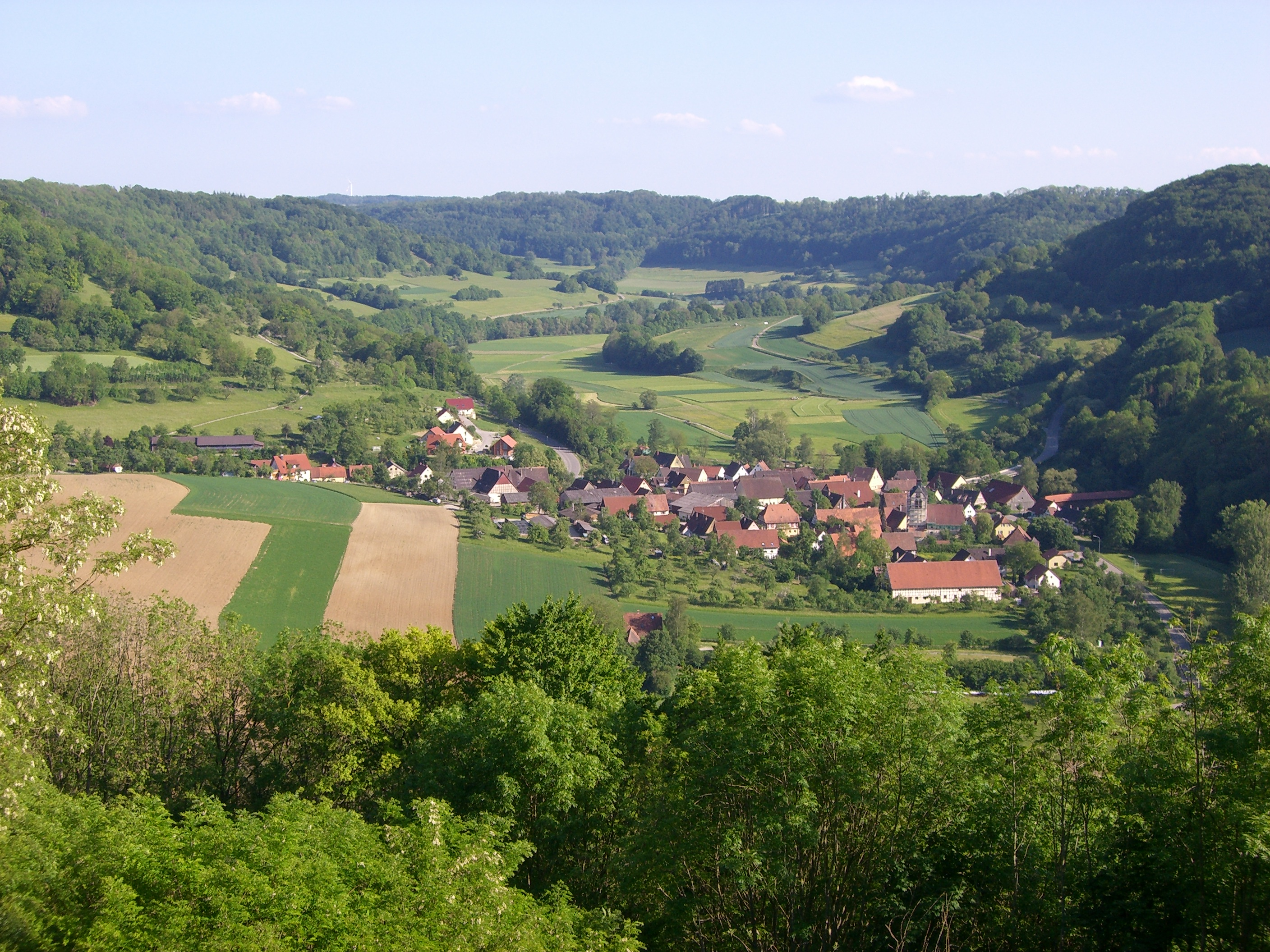 Blick von Langenburg jagstaufwärts und Richtung Südost auf Bächlingen